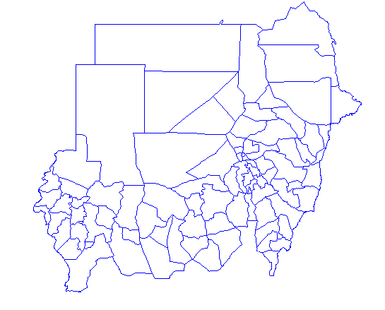 Mapa de los Distritos de Sudan, luego de la independencia del Sur